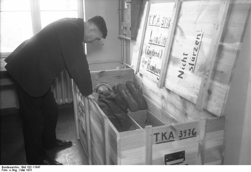 Die deutsche Kriminal-Polizei im Kampf gegen das zunehmende Verbrechertum! Der blinde Passagier in der Kiste. Ein interessantes Stück aus der Lehrmittel-Sammlung des Polizei-Instituts. In dieser Kiste wurde ein blinder Passagier auf der Ueberfahrt von Hamburg nach England entdeckt.